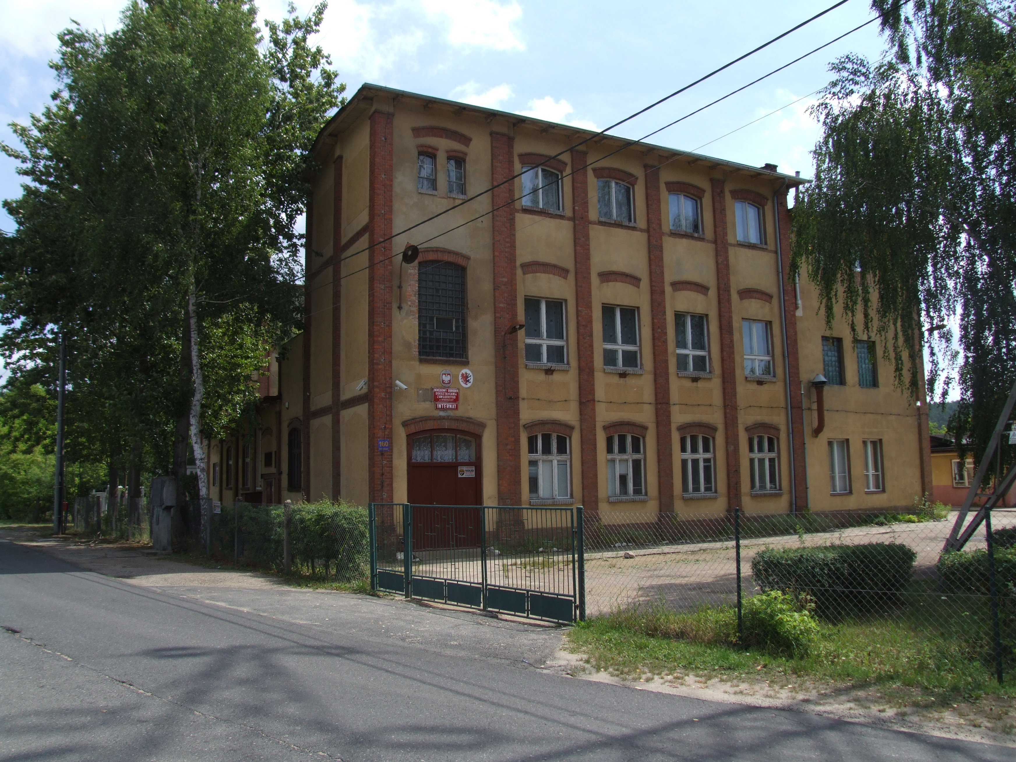 Miejsce przetrzymywania osób przez faszystów, Bydgoszcz-Smukała